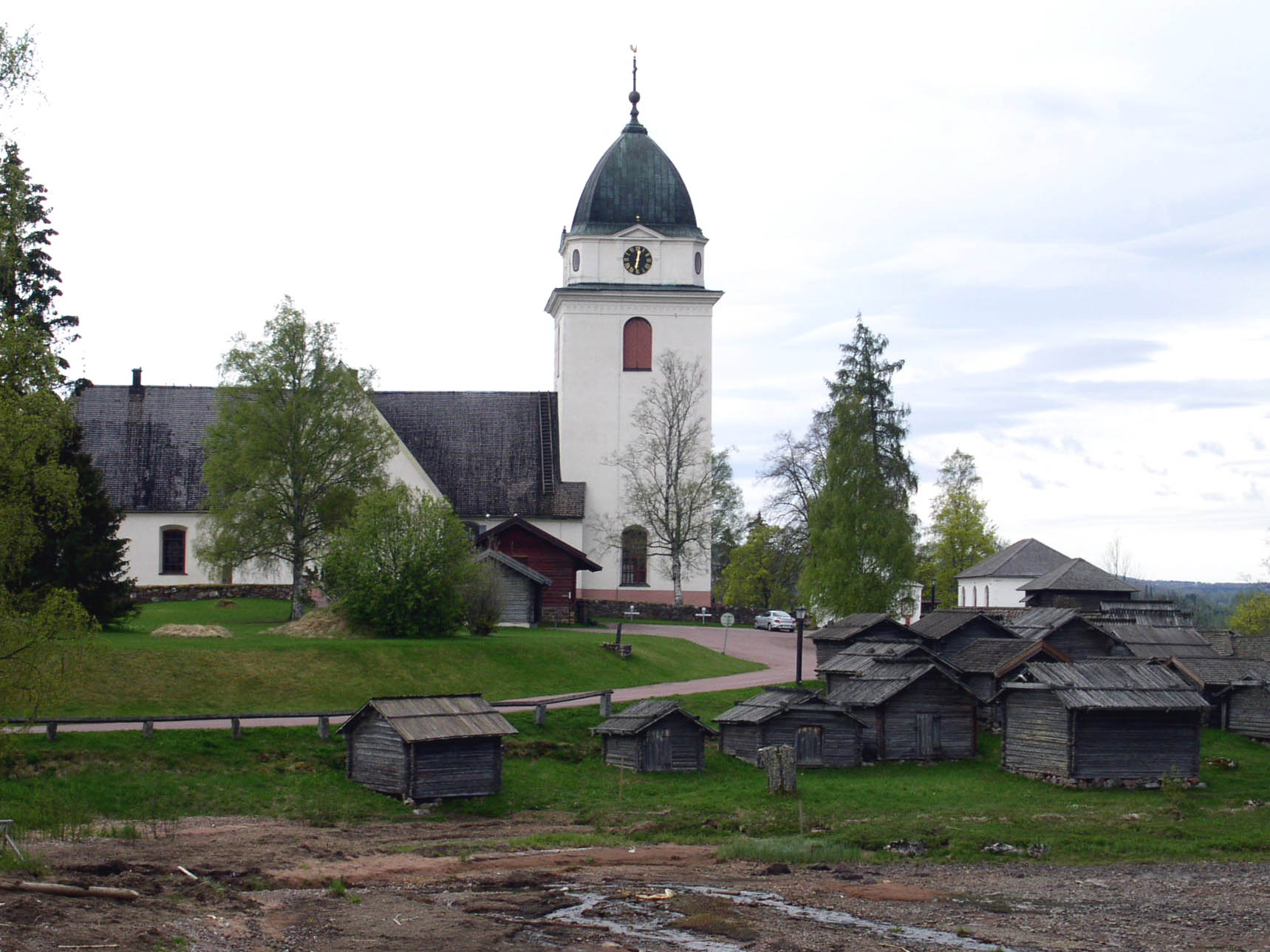 Rättviks kyrka med kyrkstallar, Dalarna